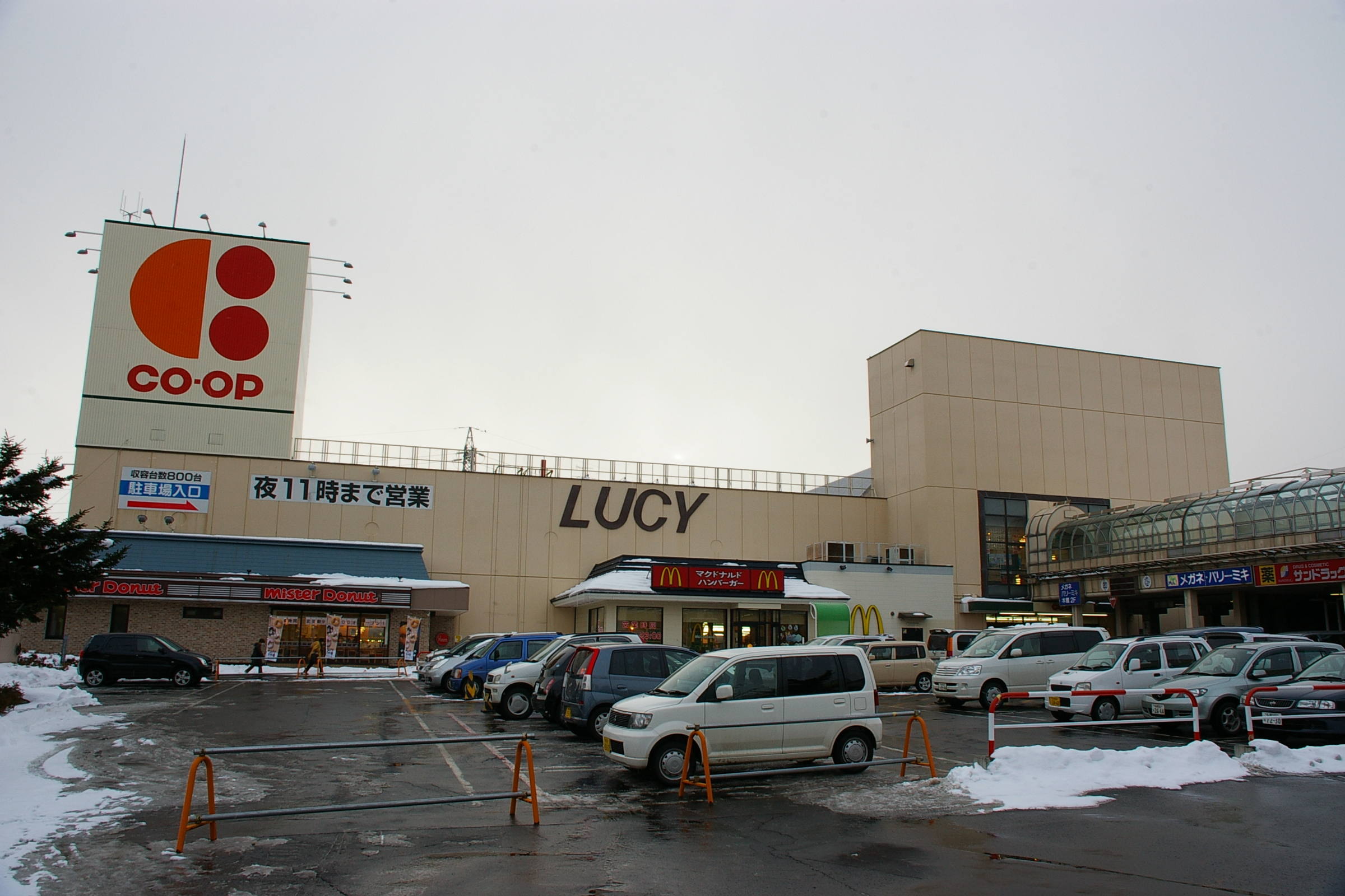 CO-OP Sapporo LUCY Ohyachi.